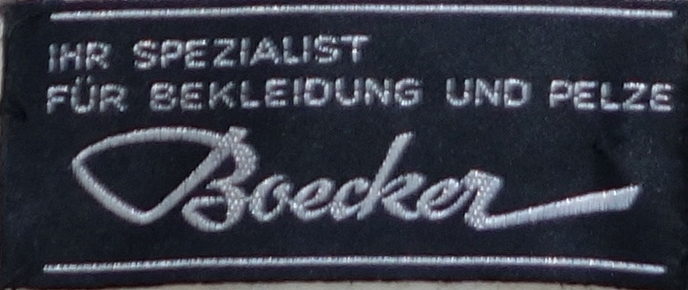 Boecker, Ihr Spezialist für Bekleidung und Pelze (Web-Einnähetikett). Original